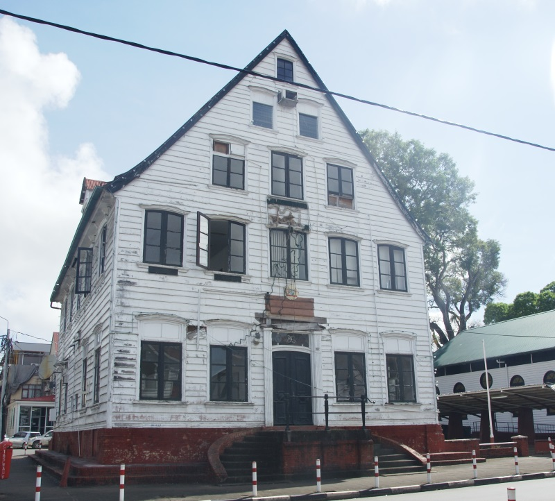 Wagenwegstraat 22, Paramaribo, Suriname